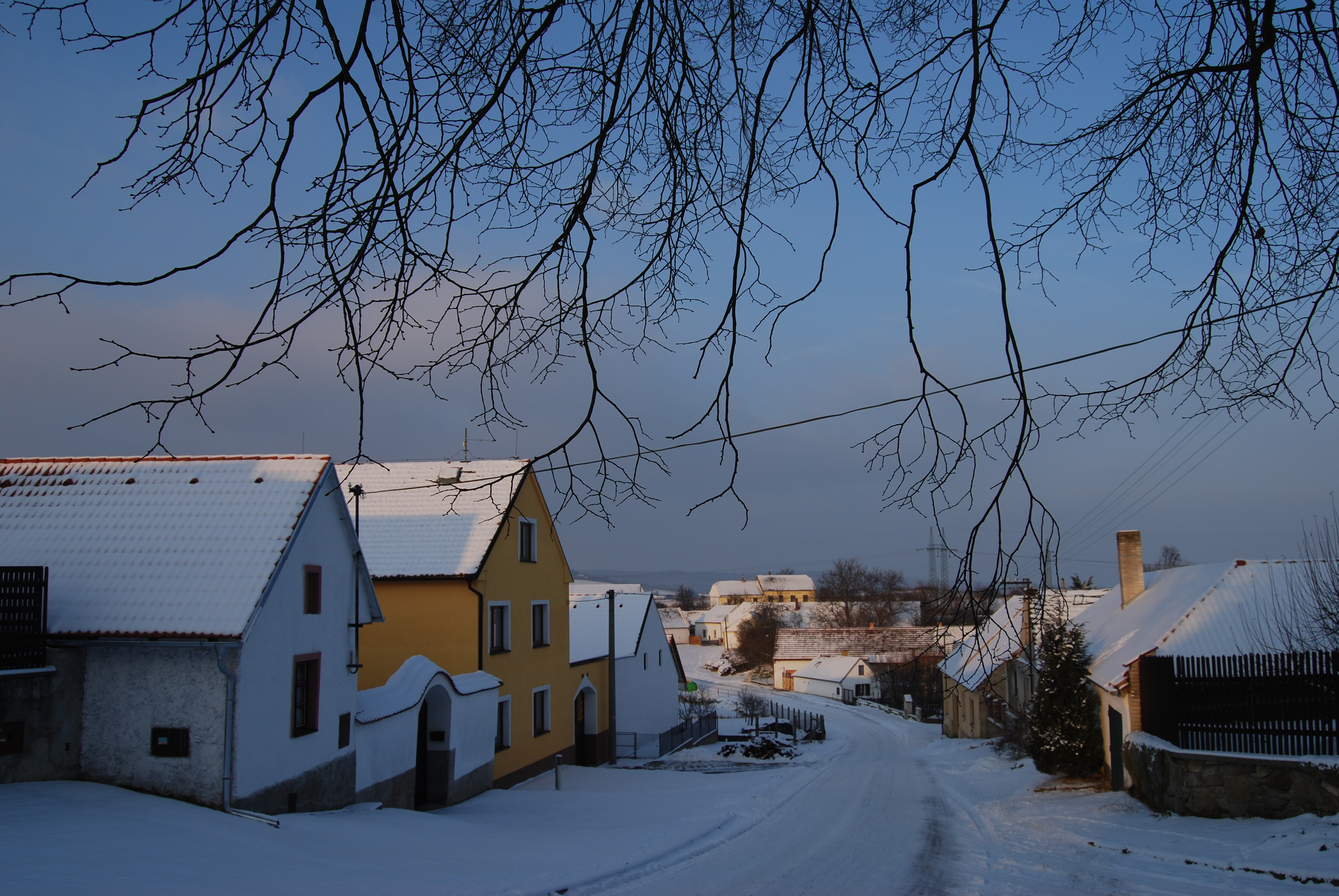 Pohled na obec ve směru od Mlak. Chlaponice (Drhovle). Okres Písek. Česká republika.